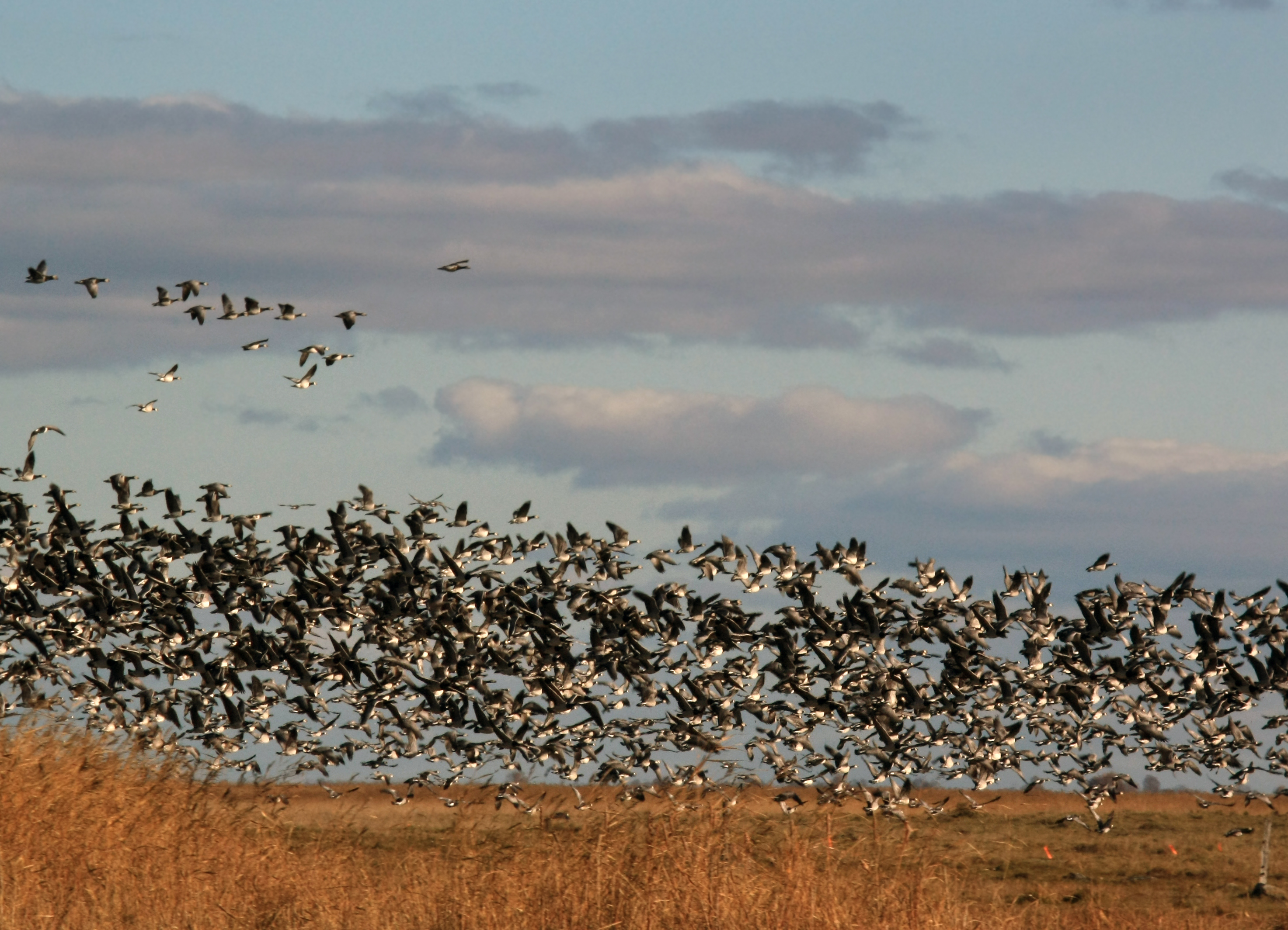 Tihe lennuparv Haeska roostikus Matsalu looduskaitsealal